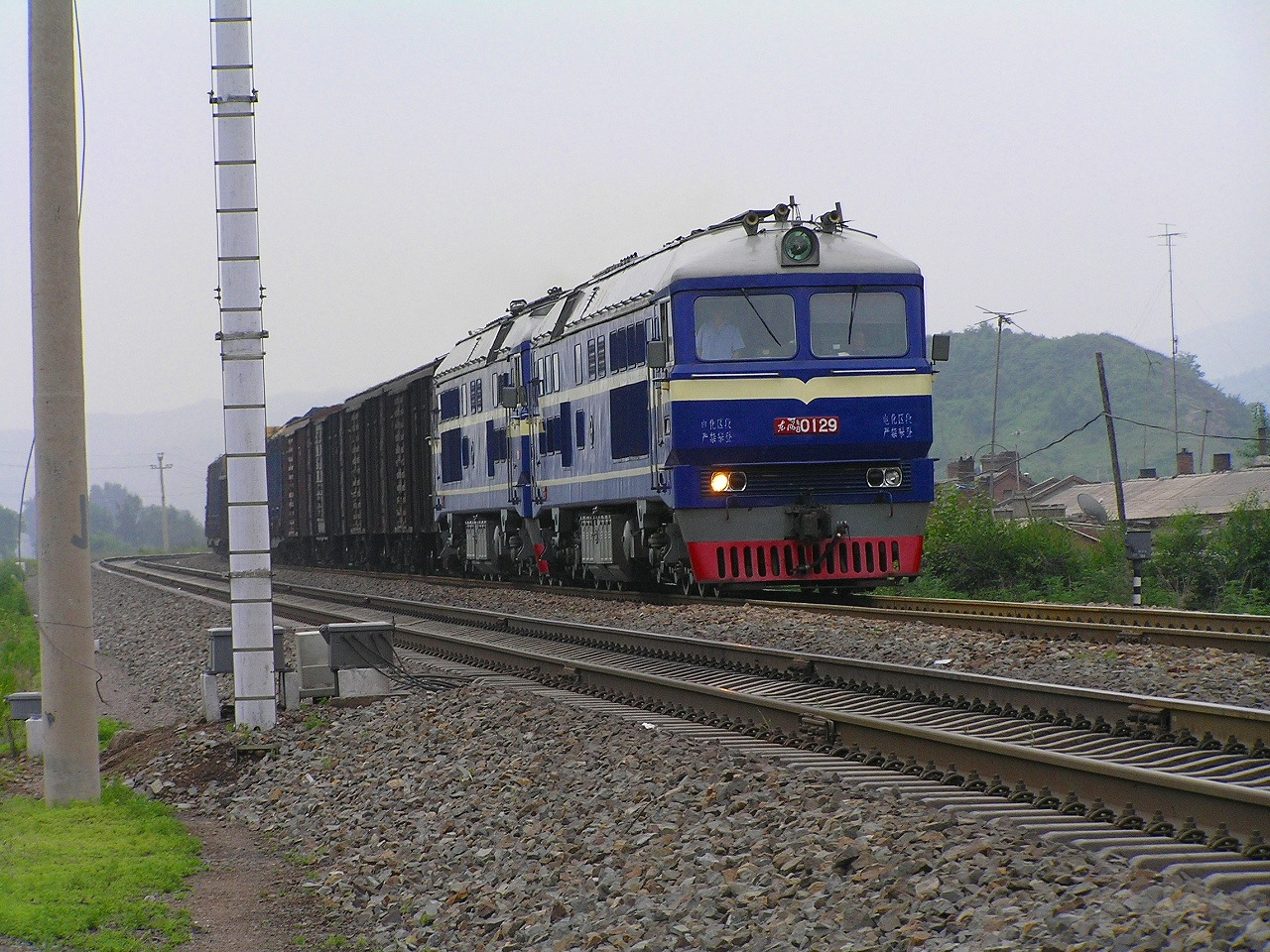 中国貨物列車（玉泉駅付近）